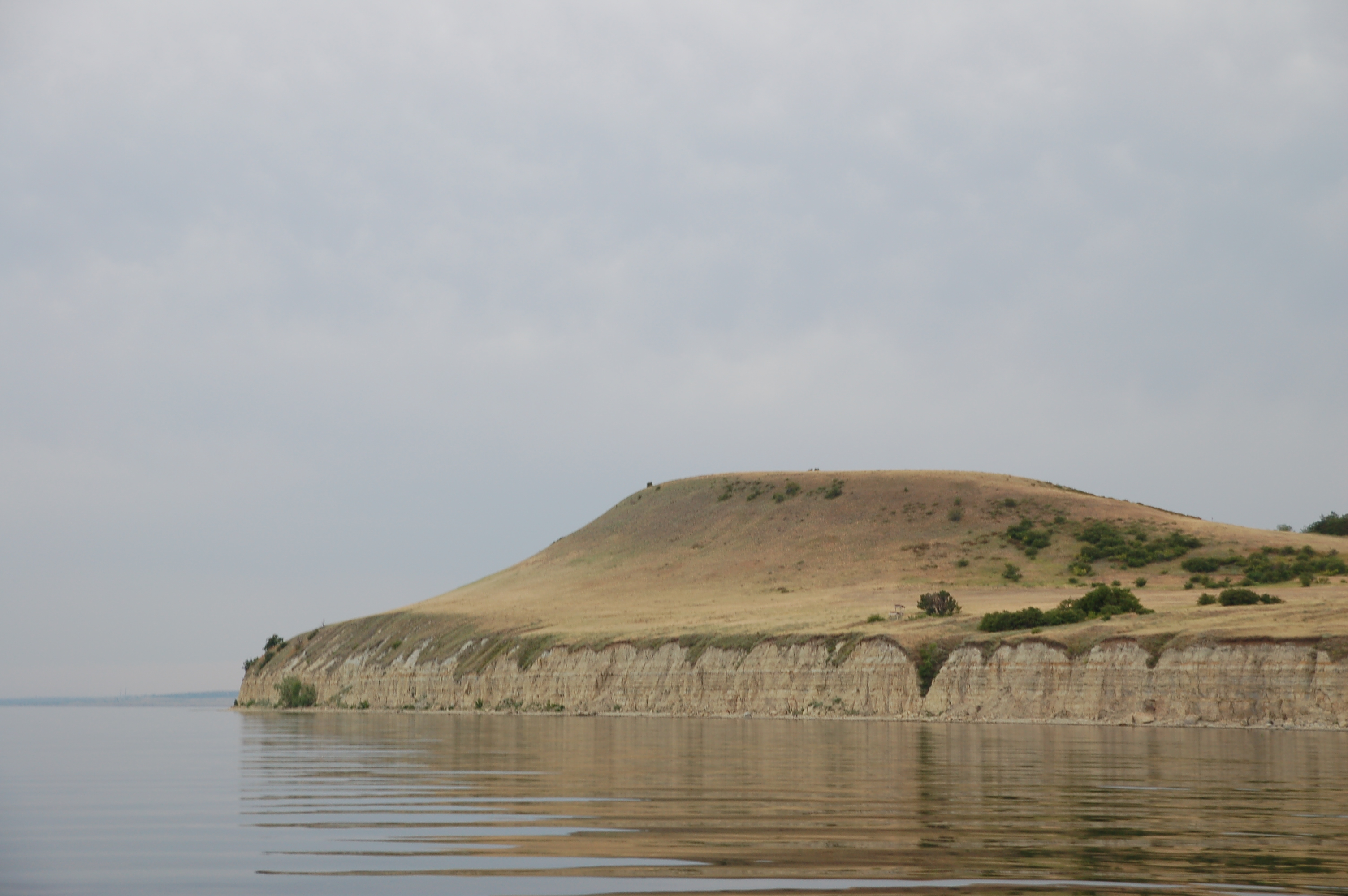 Ураков бугор. Южная граница ГУ ПП Щербаковский. Возвращение на турбазу по Волге